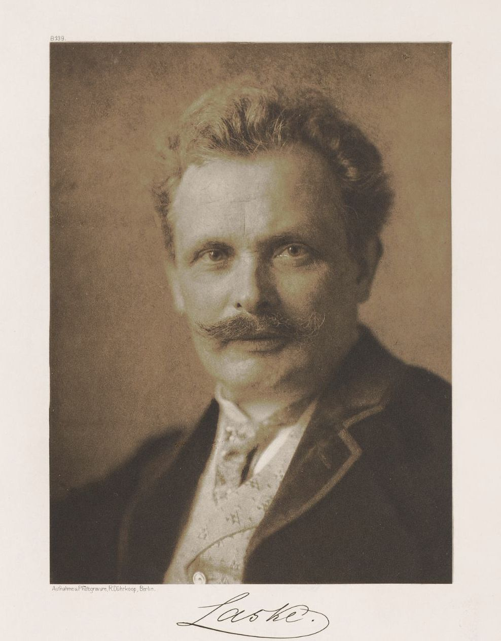 Fritz Laske. Foto.